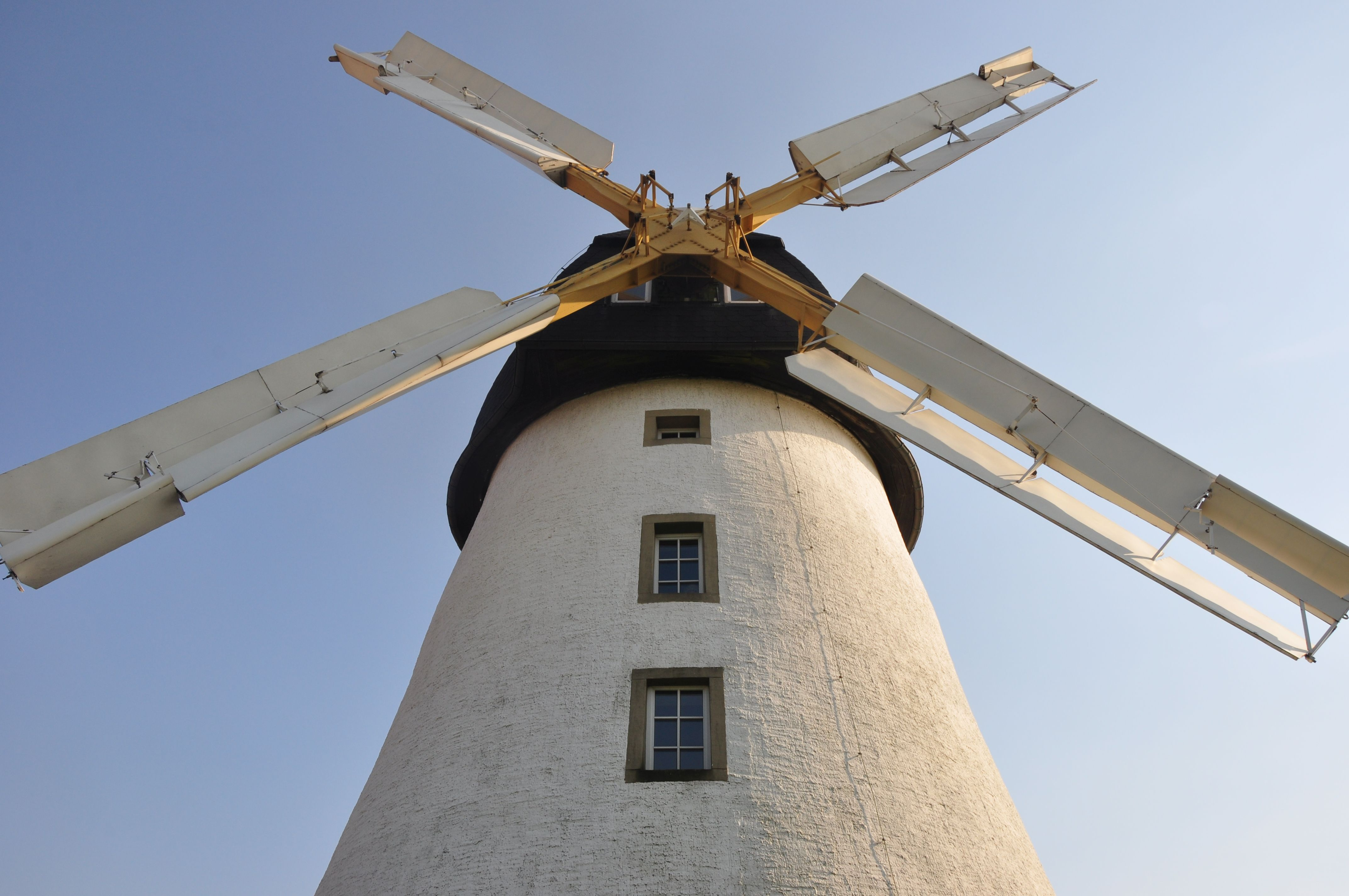 Rutenkreuz der Bockwitzer Windmühle (Würchwitz bei Zeitz/Sachsen-Anhalt) im Sommer 2015